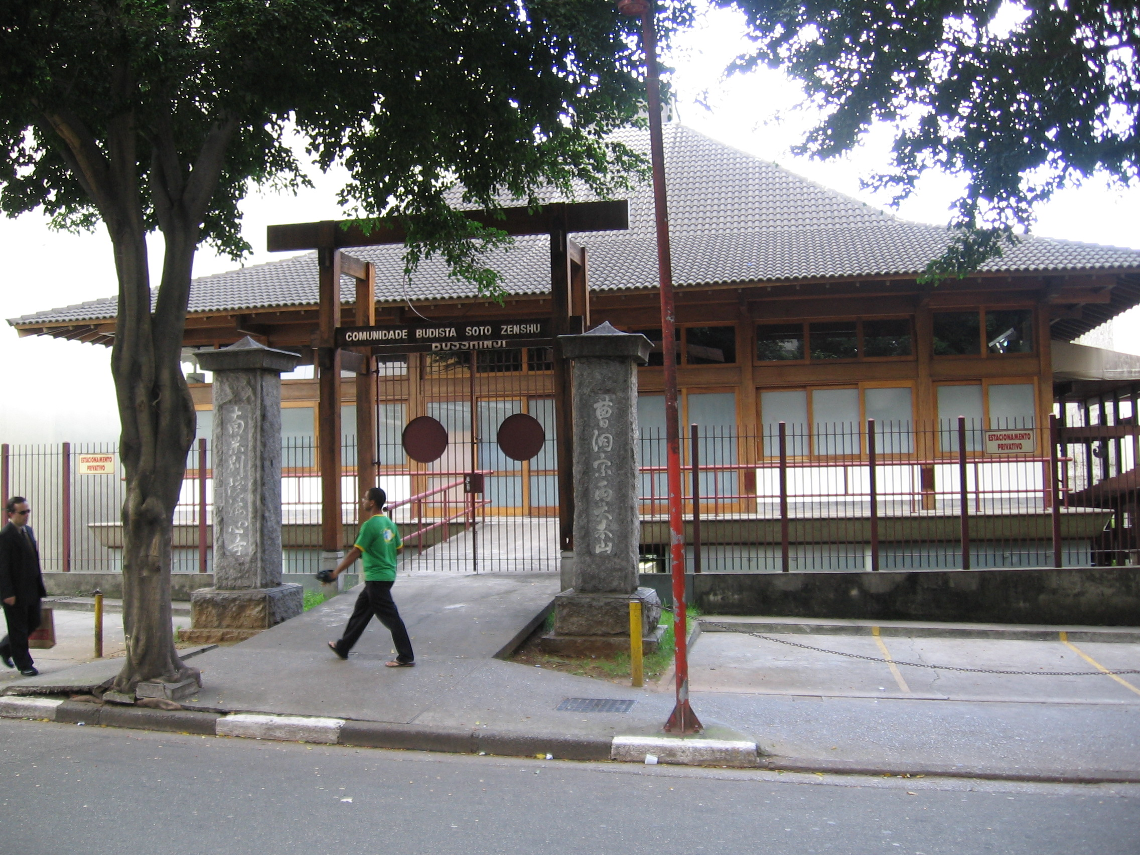 Picture of Sotozen temple Busshinji (Rua São Joaquim, 265 - Liberdade) in São Paulo, SP, Brazil.